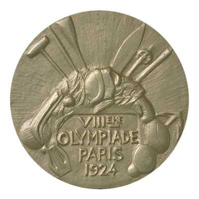 Médaille d'argent JO 1924 – Revers